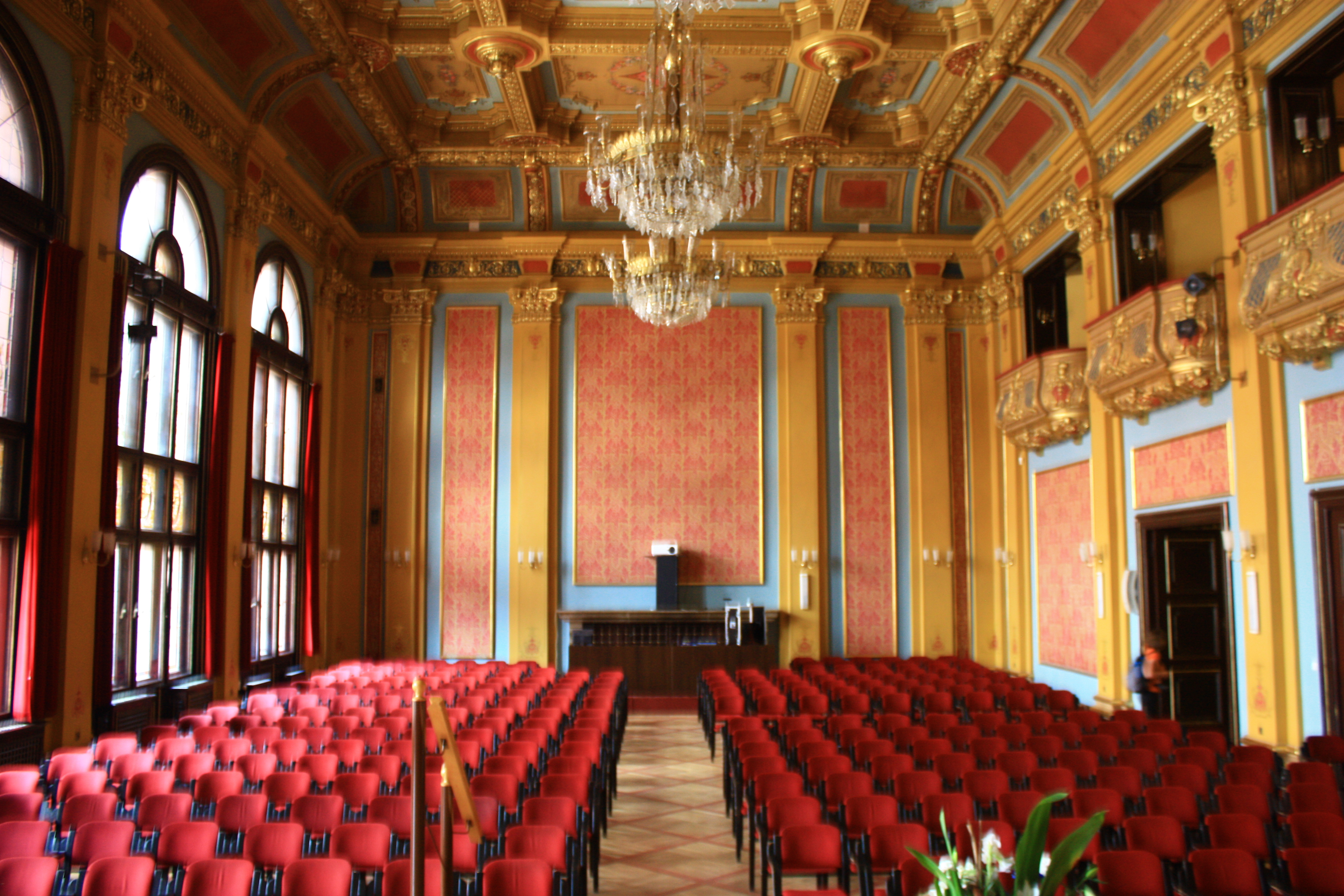 Toruń, Dwór Artusa, 1889-1891